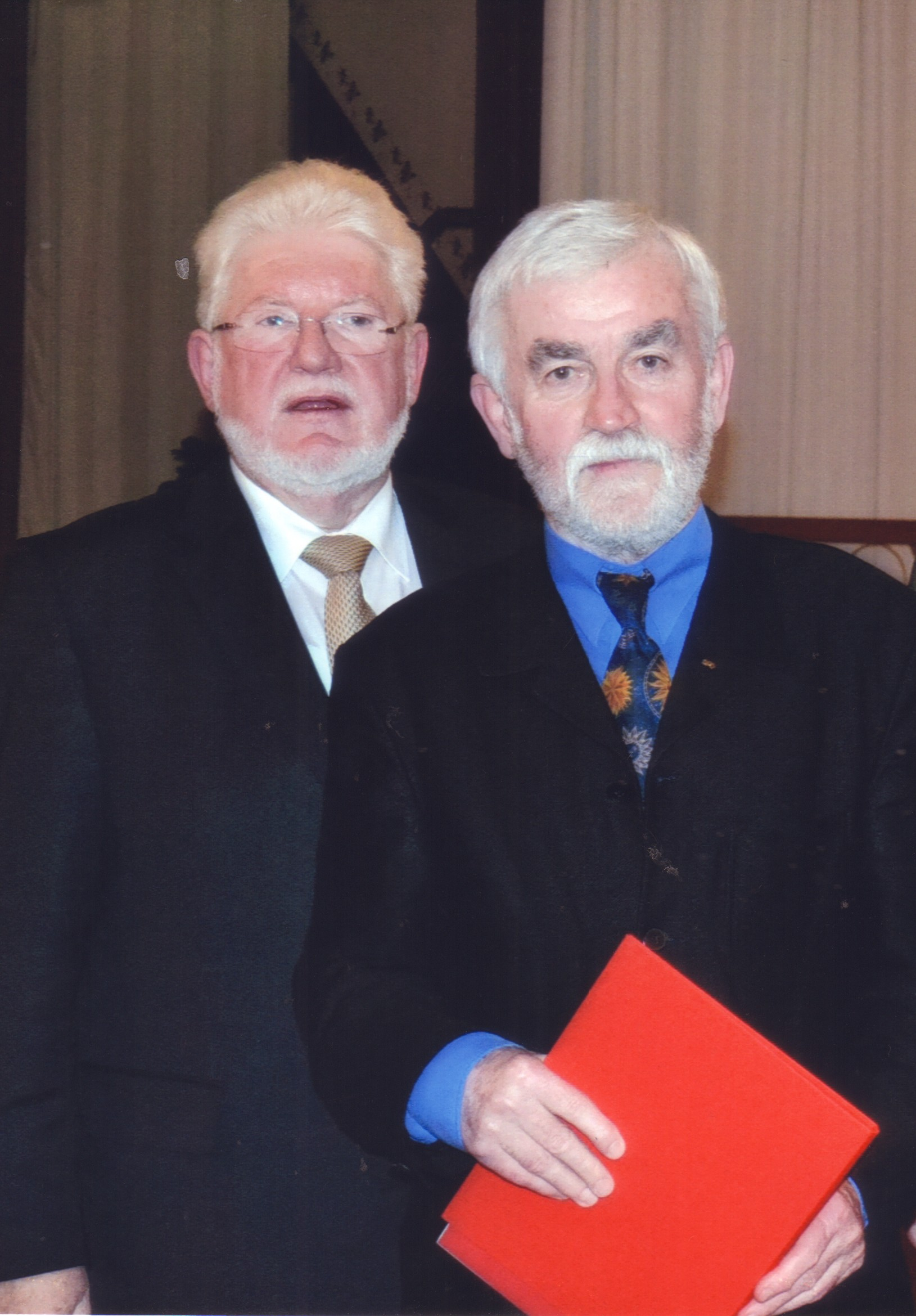 Der frühere Staatssekretär des Niedersächsischen Umweltministeriums Dietmar Schulz (rechts) zusammen mit dem früheren Parlamentarischen Staatssekretär Gerd Andres bei den Feierlichkeiten zur Ehrung des Erstgenannten für die 50jährige Mitgliedschaft in der Sozialdemokratischen Partei Deutschlands im Ortsverein Groß-Buchholz in Hannover am 13. Dezember 2015.